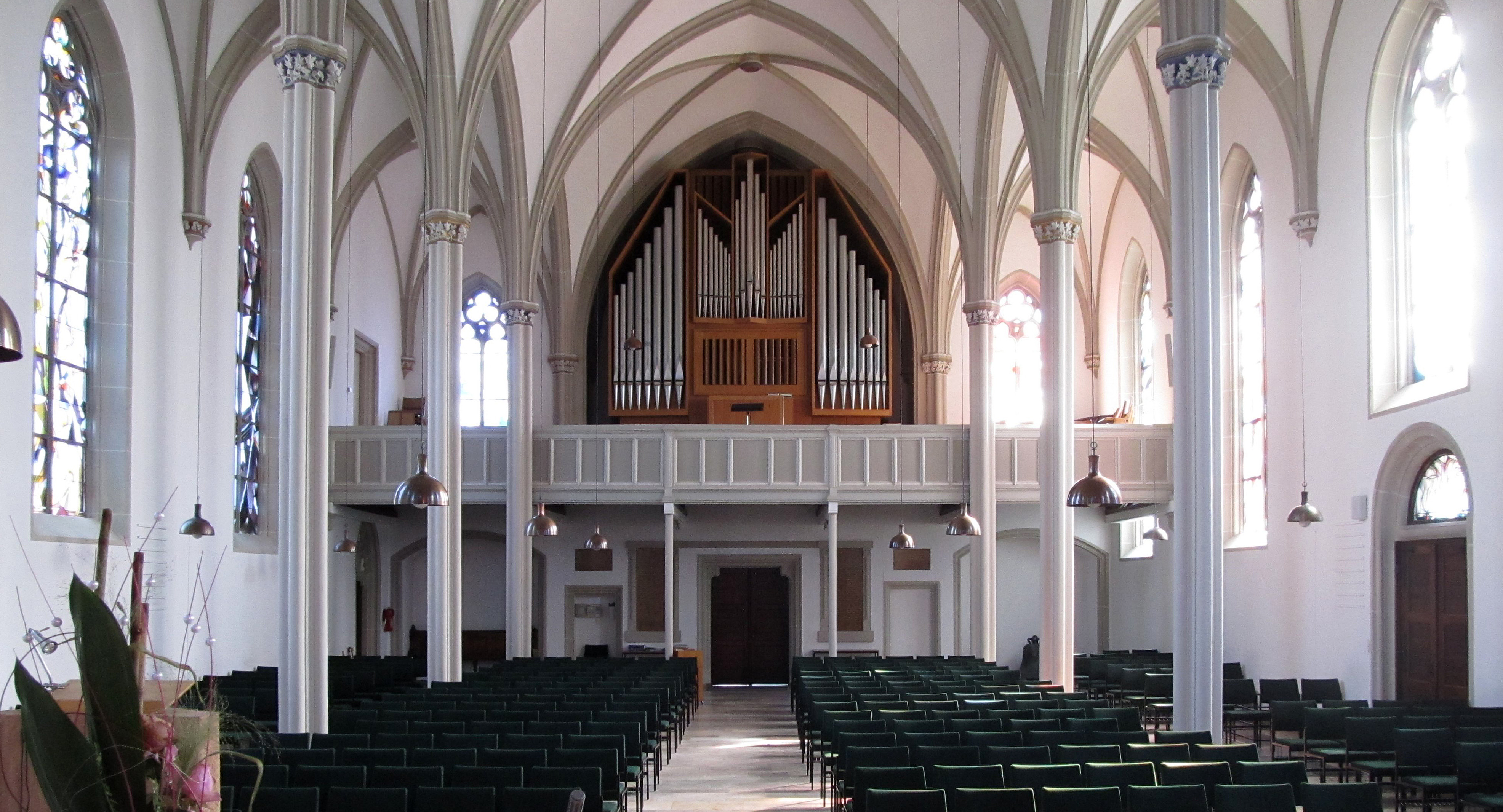 Blick ins Innere der prot. Stadtkirche in Homburg, Saarland